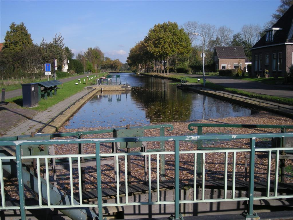 Vosseburen (buurtschap en verlaat), Opsterland